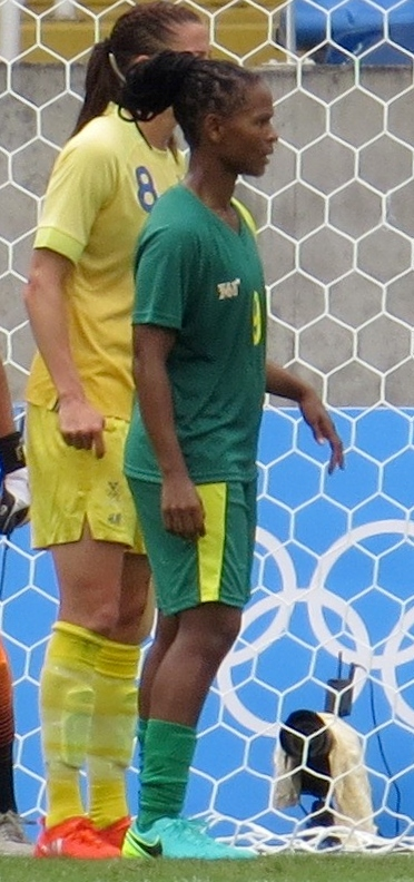 Futebol feminino Suécia 1 x0 Africa do Sul 03/08/16